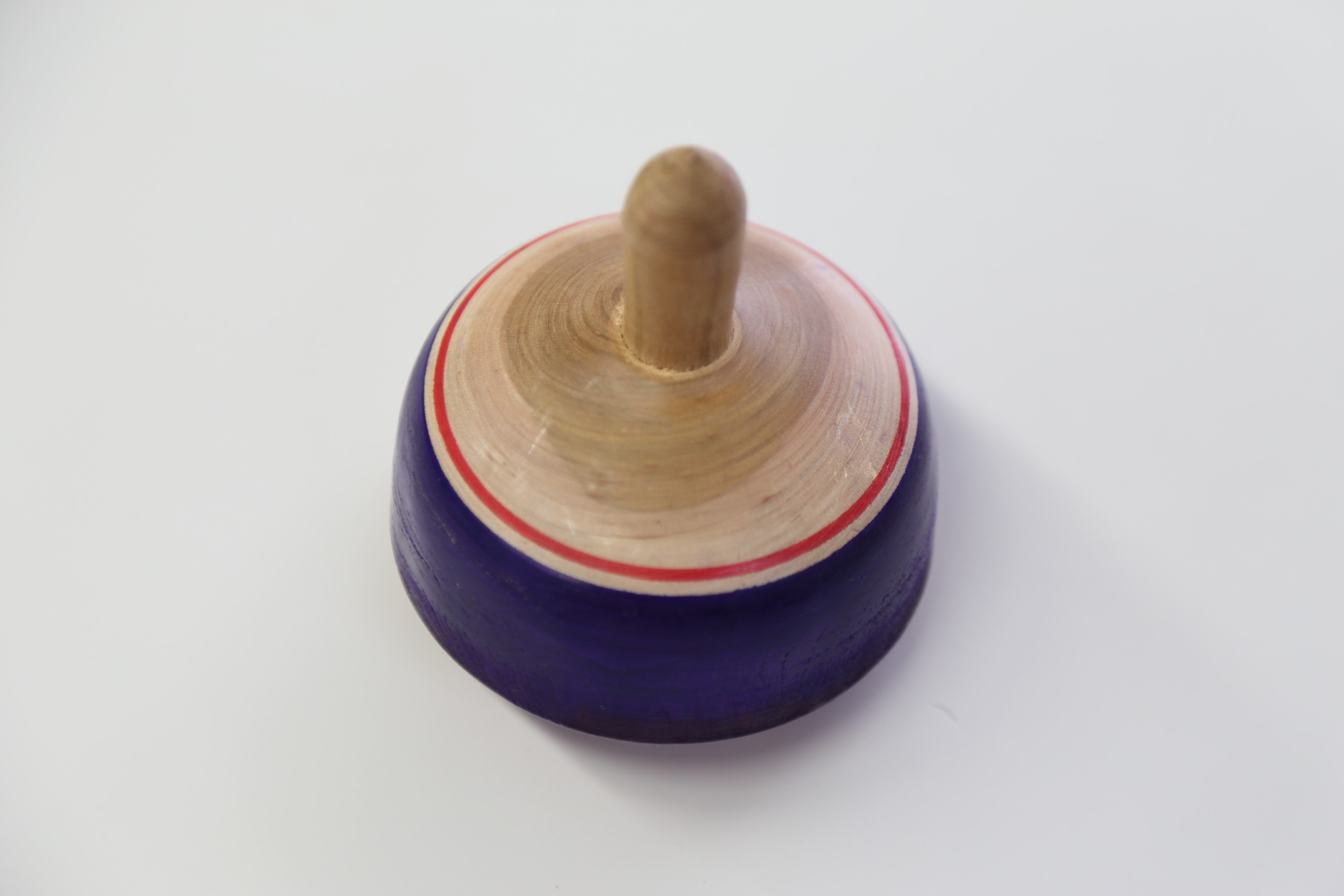 伊勢原市の伝統工芸品である「大山こま」。下部から撮影。